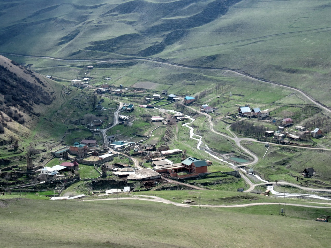 Ирон: Хохы Санибайы хъæу (уый дæр Зæронд Саниба)